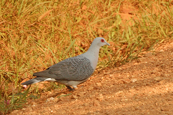 Uganda Afep Pigeon Columba unicincta